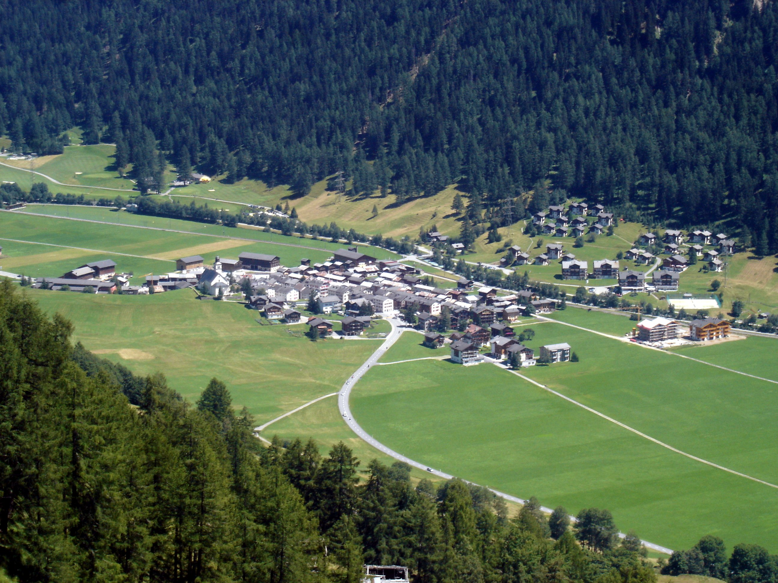 Obergesteln